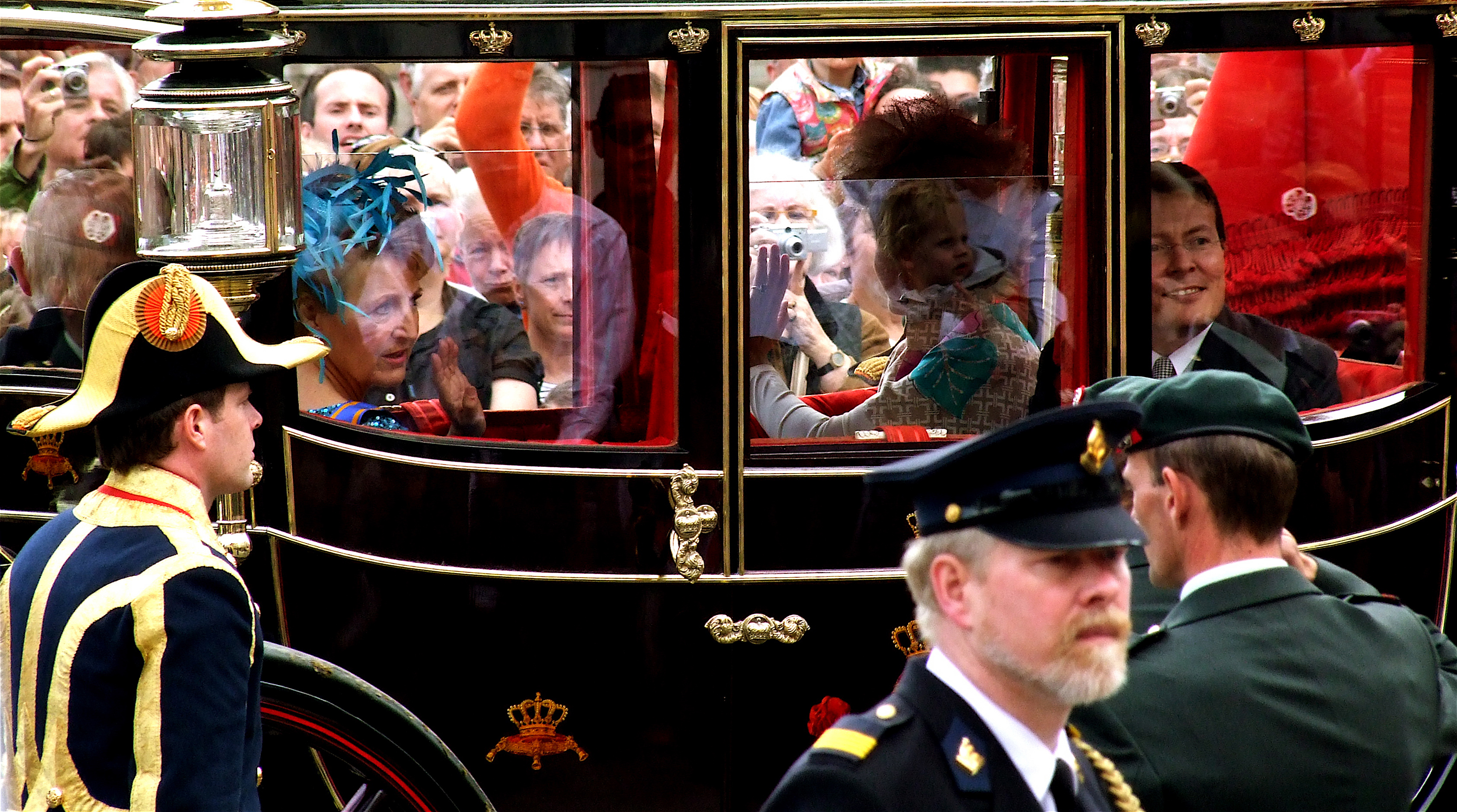 Foto gemaakt tijdens de rijtoer op prinsjesdag Den Haag (kneuterdijk)